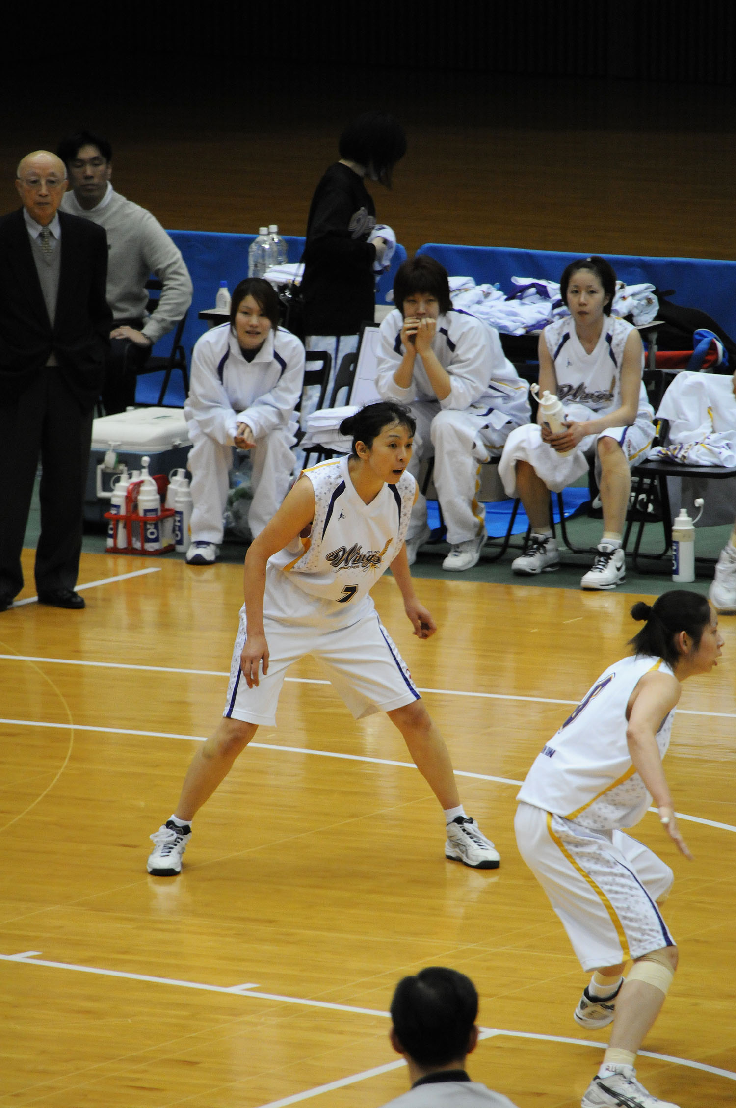 アイシンAWウィングスの小磯典子選手。とどろきアリーナで。